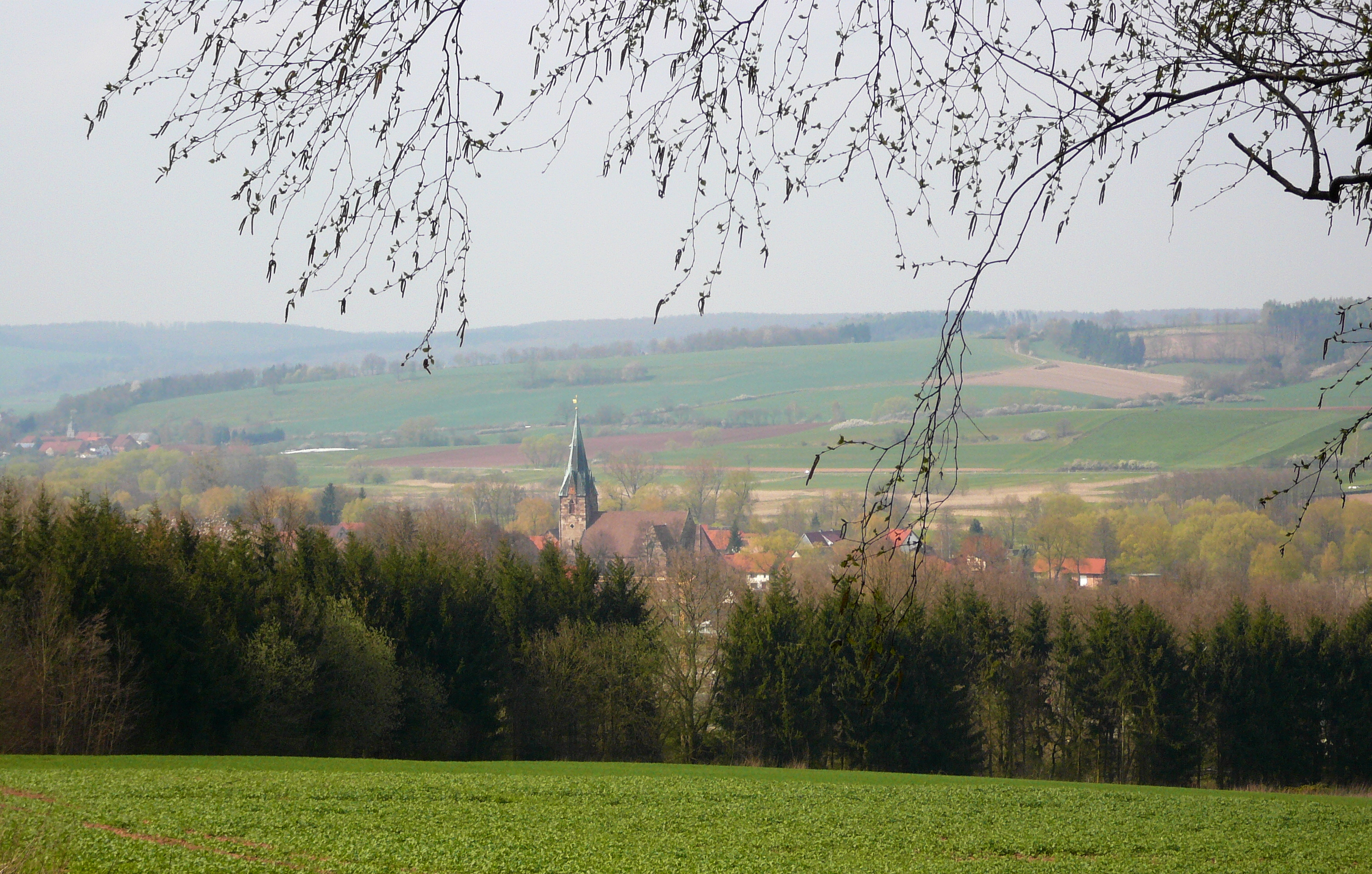 Blick von Südwesten über Rüdershausen